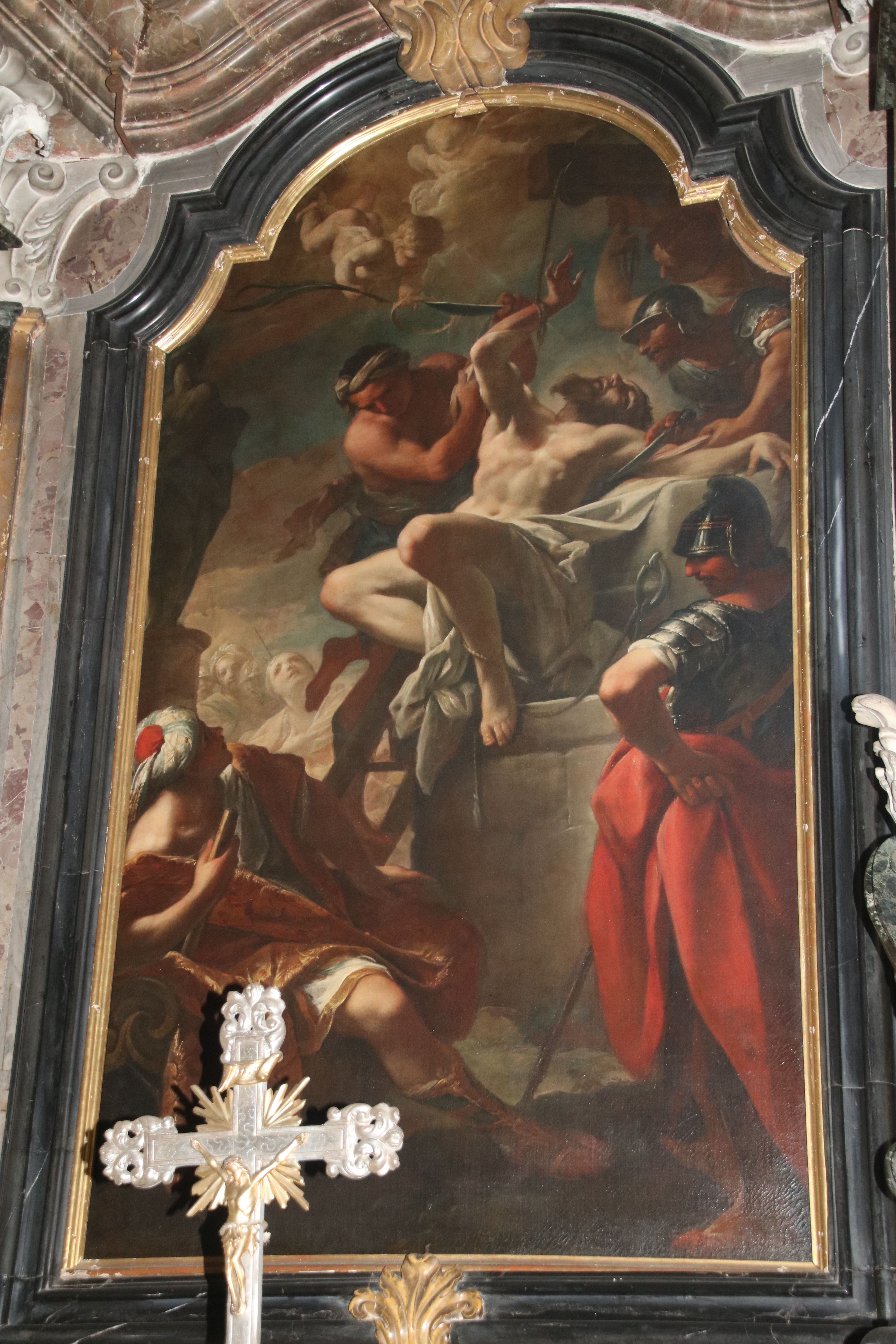 chiesa di San Sisto This is a photo of a monument which is part of cultural heritage of Italy.